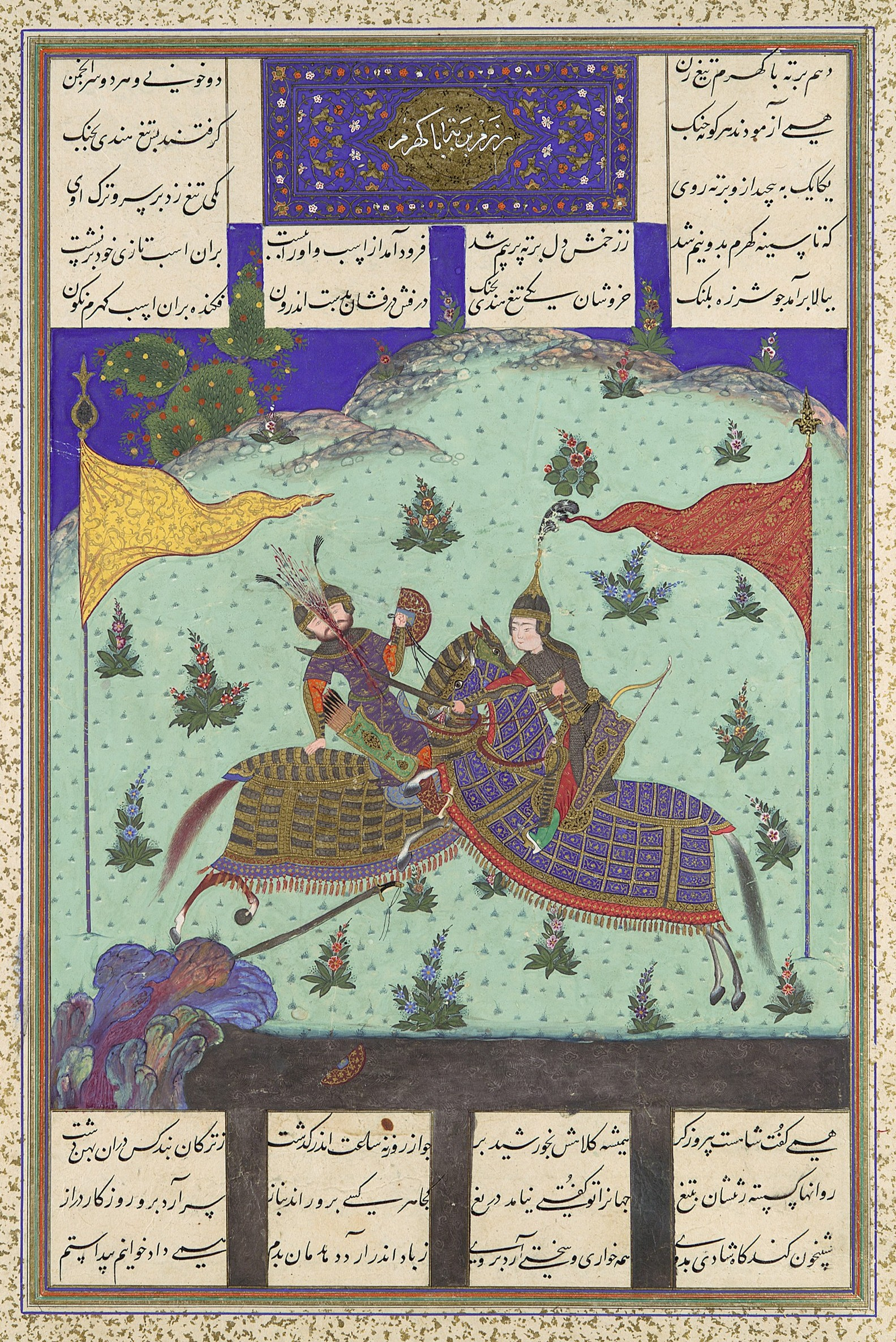 Barta versus Kuhram 12 Rokh the famous war between Iran& Turan